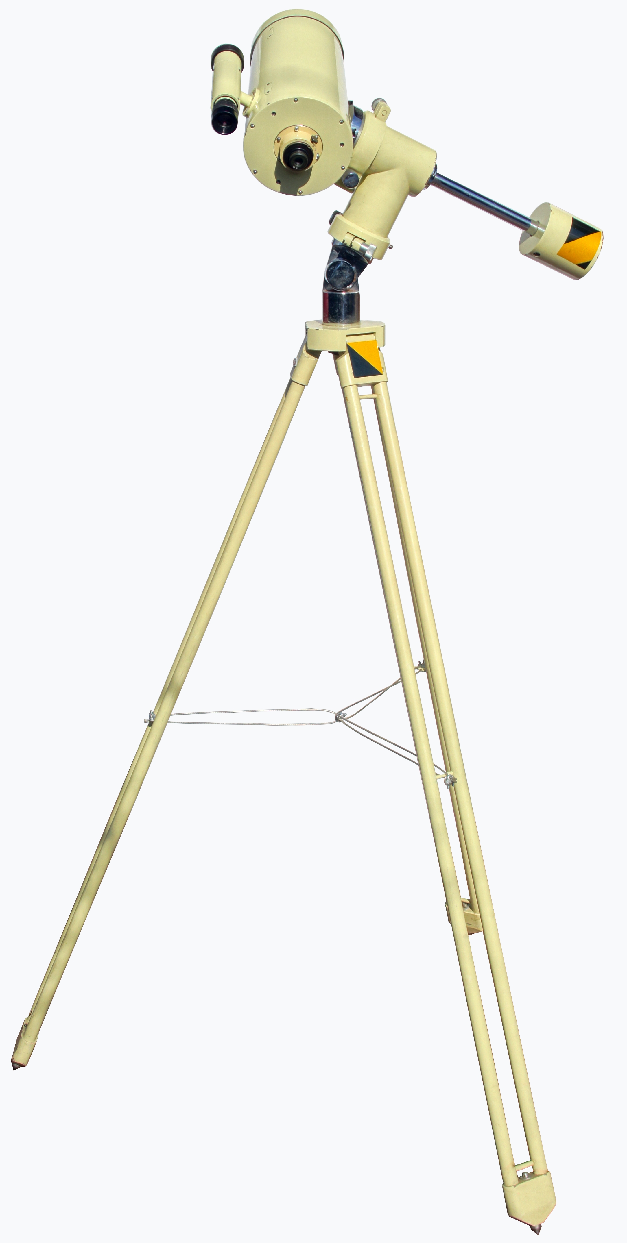 Телескоп БАМ-5А – это Бюраканский телескоп системы Д. Д. Максутова. Преимущество телескопов этого типа состоит в больших размерах полезного поля зрения. Основные характеристики телескопа: Эквивалентное фокусное расстояние f′ = 1176,6 мм Диаметр светового отверстия De = 100 мм Относительное отверстие А1: 11,77 Поле зрения 15º′ Увеличение системы при окуляре с фокусным расстоянием f = 10 мм равно 118 раз, а при окуляре с фокусным расстоянием f = 14 мм – 84 раза. Параллактическая головка допускает установку телескопа на широтах между 0º и 90º. Общий вес телескопа – 21,5 кг.